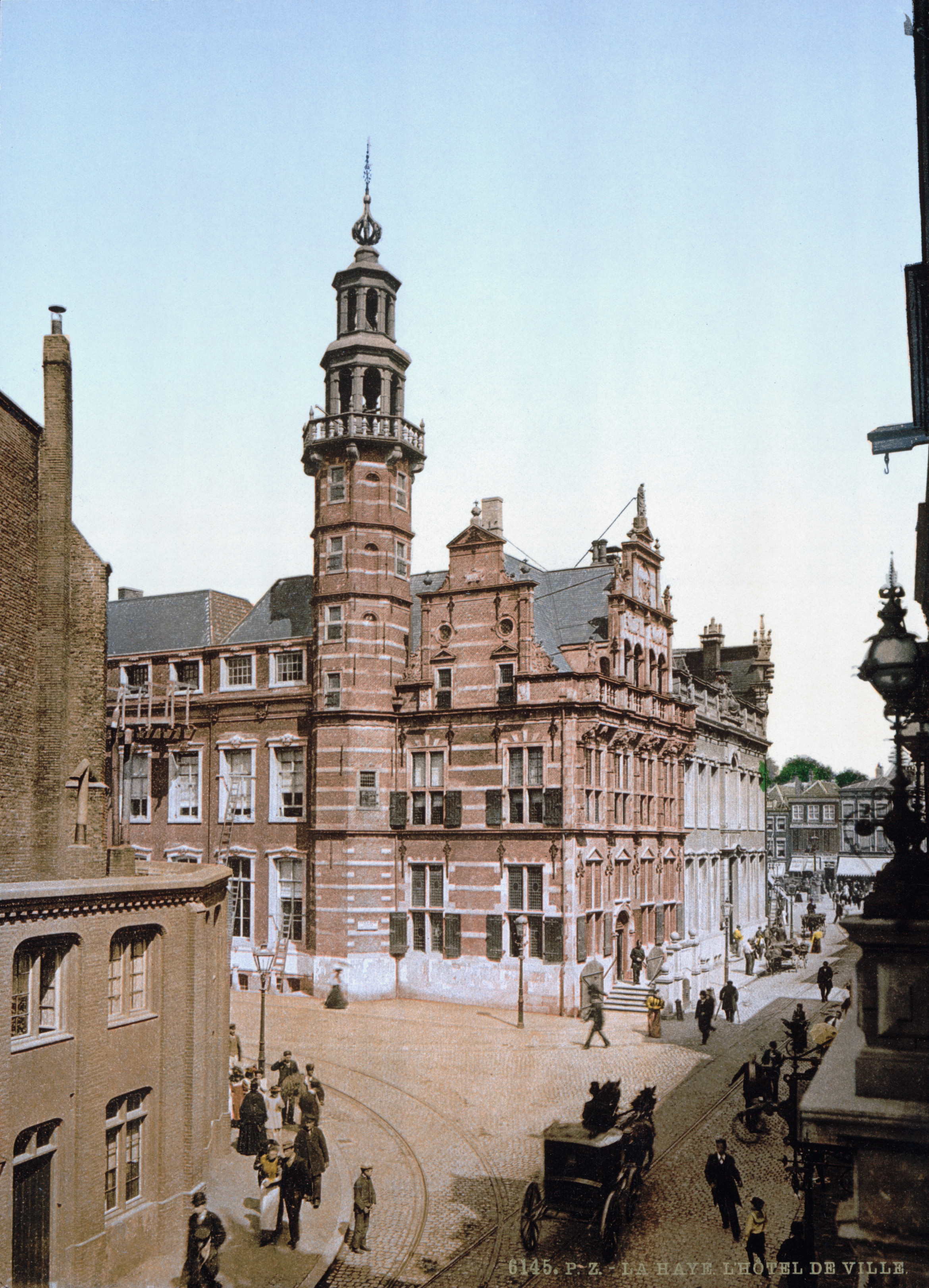 Den Haag - Stadhuis